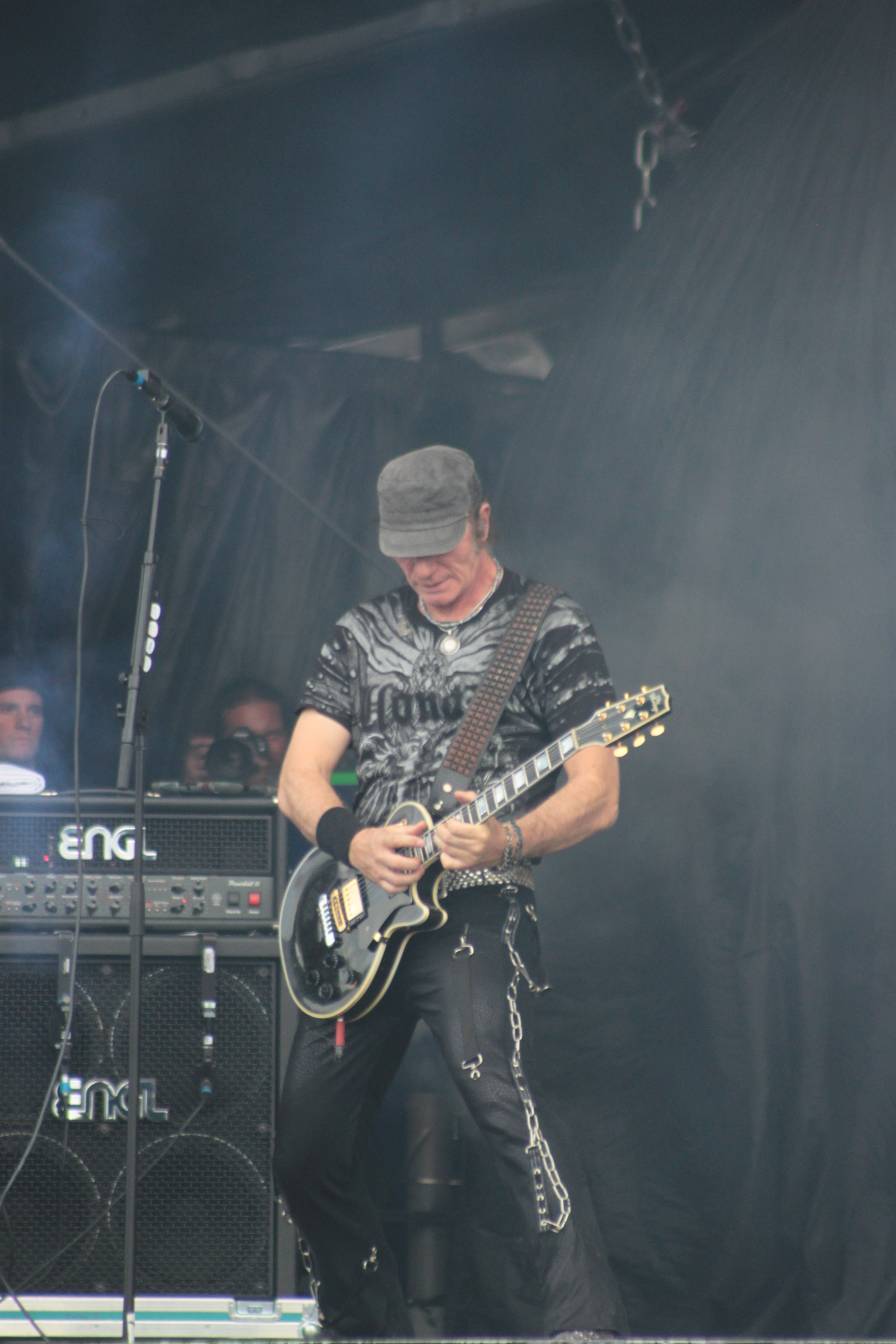 Herman Frank, Accept, Helfest 2013, Fr-44-Clisson.